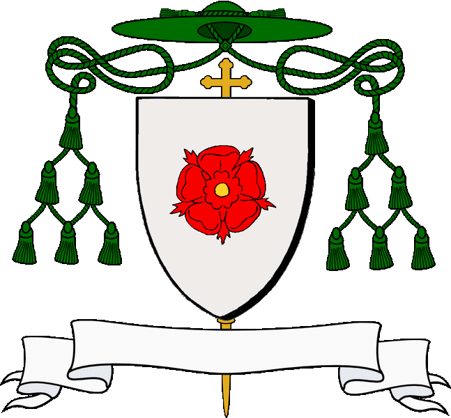 En arc'hant e rozenn en gwad nozelet en aour